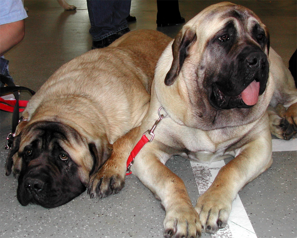 Mastiff, Kopf Mastiff 1: Aufgenommen 2004 bei einer Hundeausstellung in Dresden